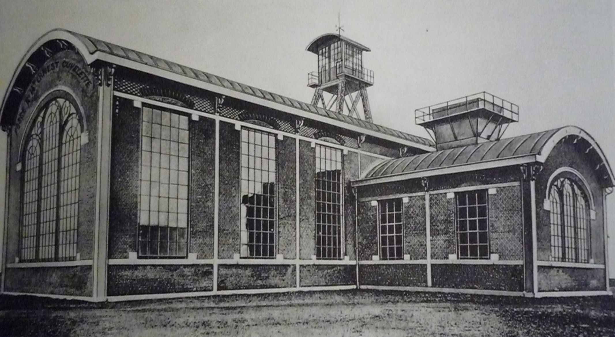 La fosse n° 14 bis de la Compagnie des mines de Lens était un charbonnage du bassin minier du Nord-Pas-de-Calais constitué d'un seul puits situé à Loos-en-Gohelle, Pas-de-Calais, Nord-Pas-de-Calais, France.